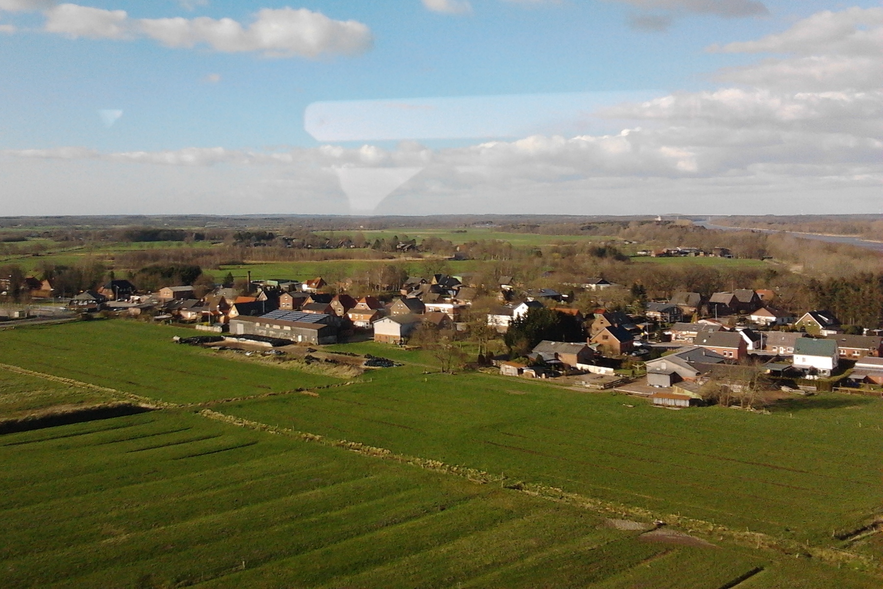 Hochdonn, Dithmarschen von der Hochbrücke aus.